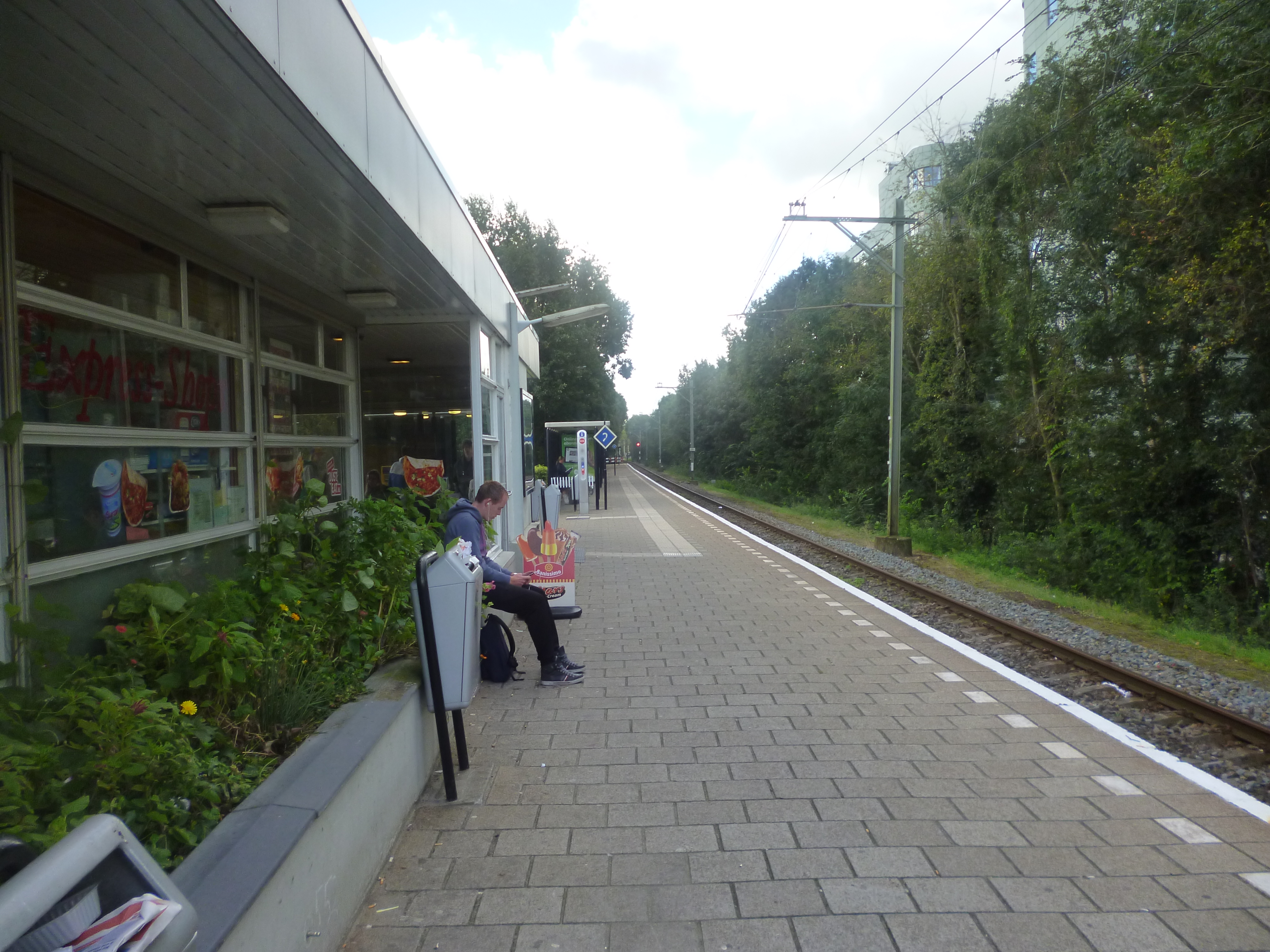 Zicht over het perron van het station Leiden Lammenschans